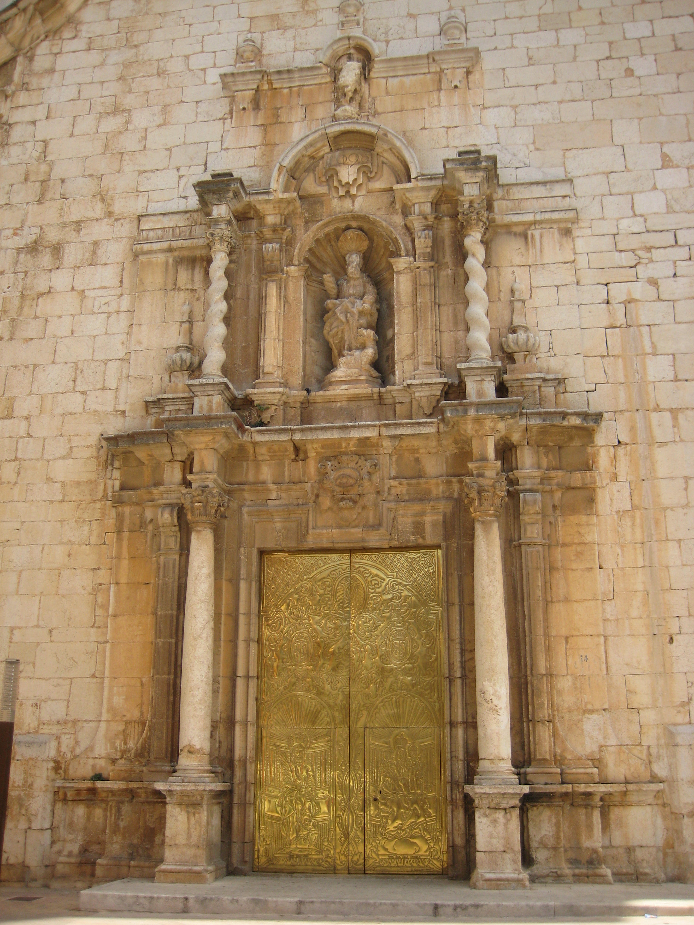 Portada principal de l'església de San Bartomeu de la Jana (Baix Maestrat)